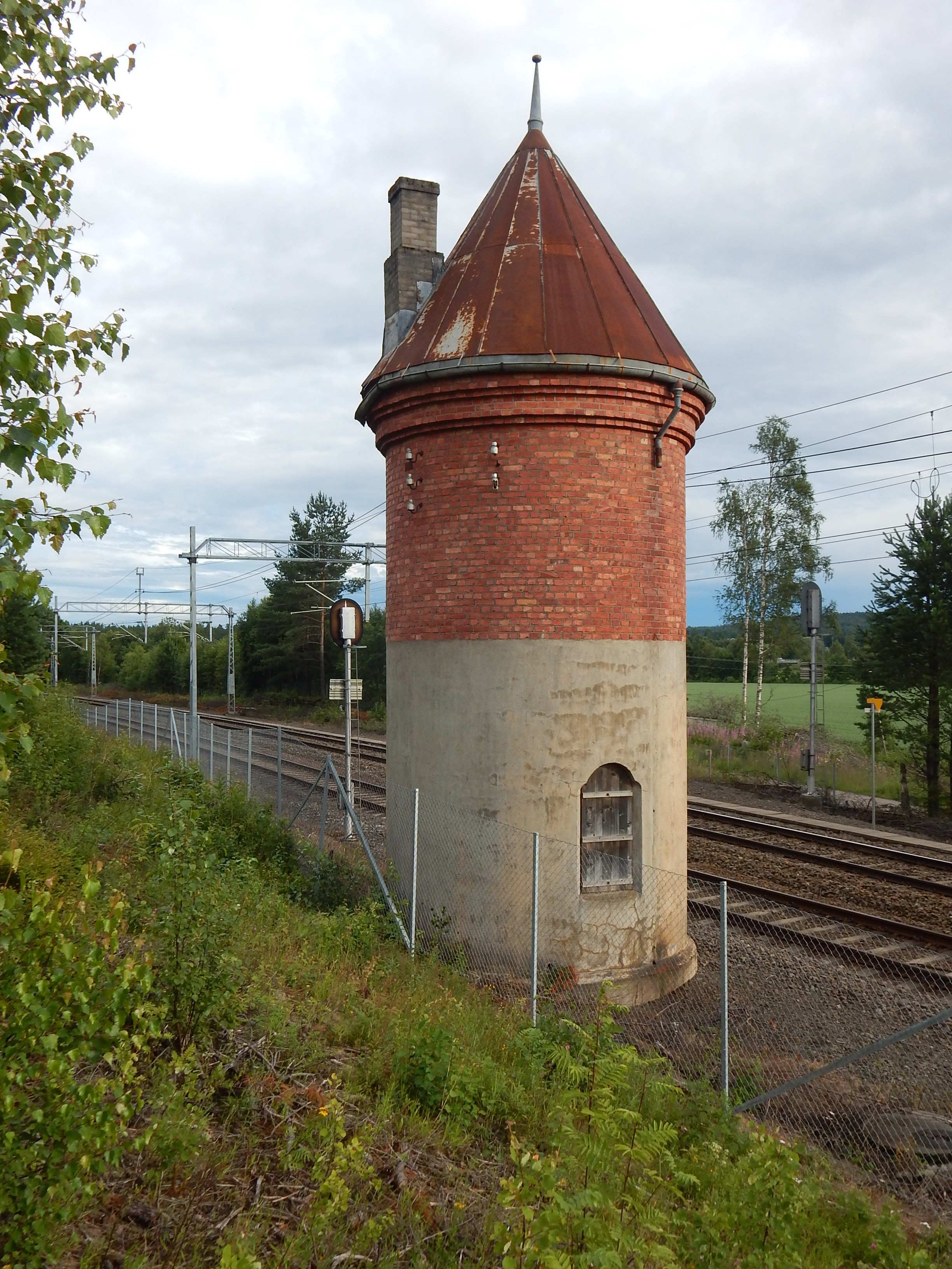 Vanntårn nordvest for Skotterud stasjon